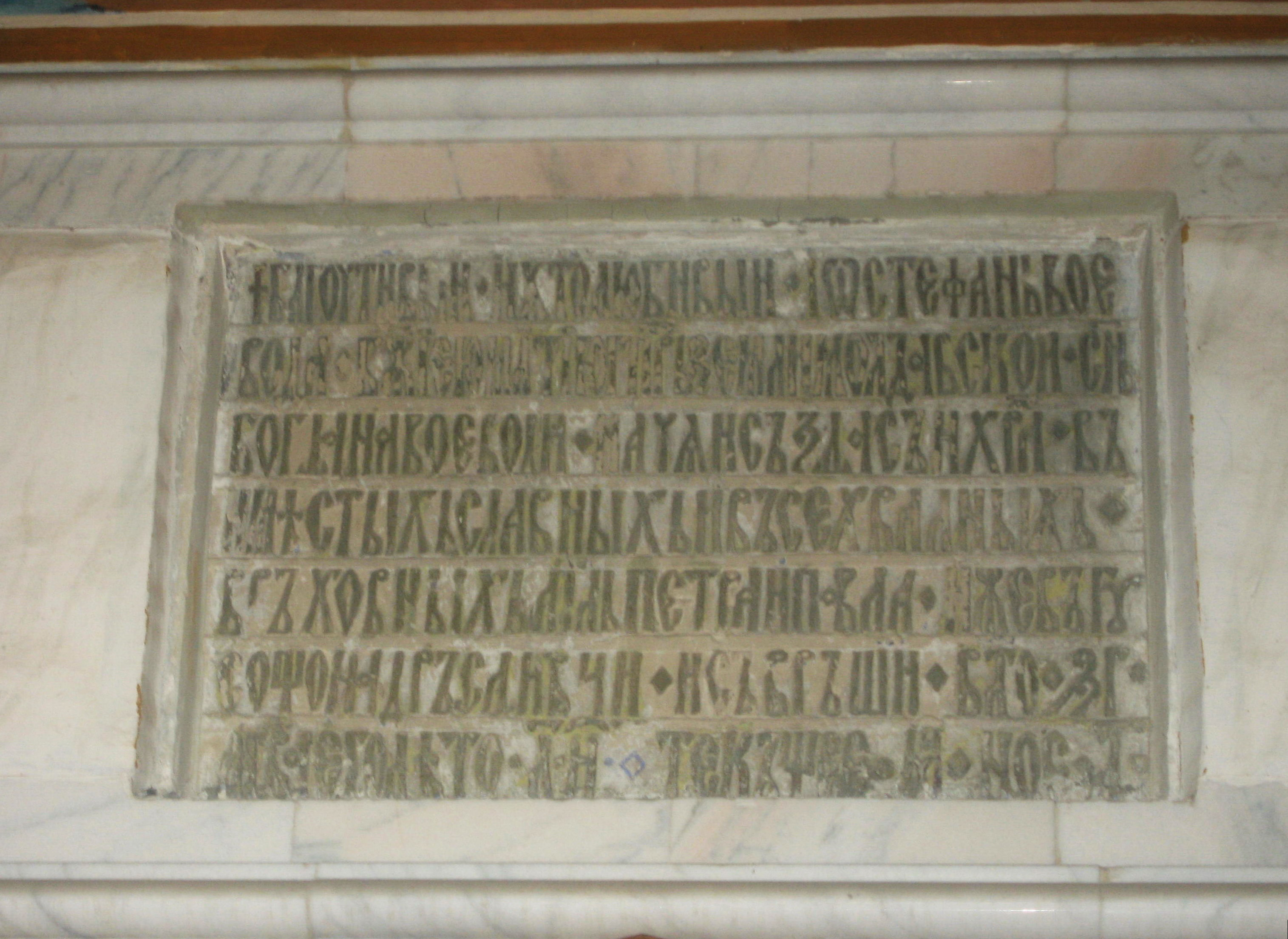 Catedrala Episcopală din Huși